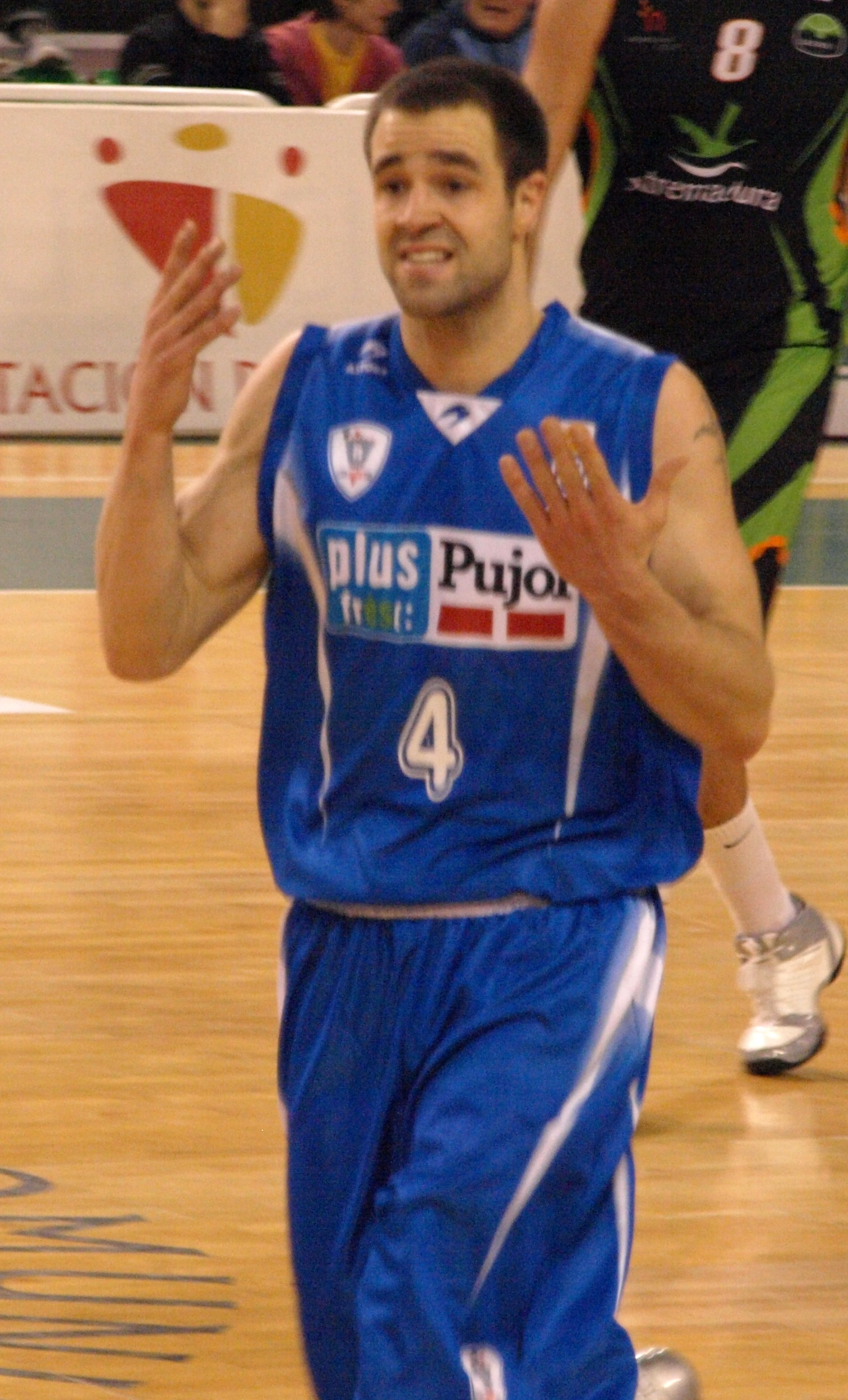 Troy DeVries, con la camiseta del Plus Pujol Lleida en el partido que su equipo disputó ante el Cáceres 2016 Basket en enero de 2009 en el pabellón Mutiusos "Ciudad de Cáceres" de la liga LEB Oro 2008/09